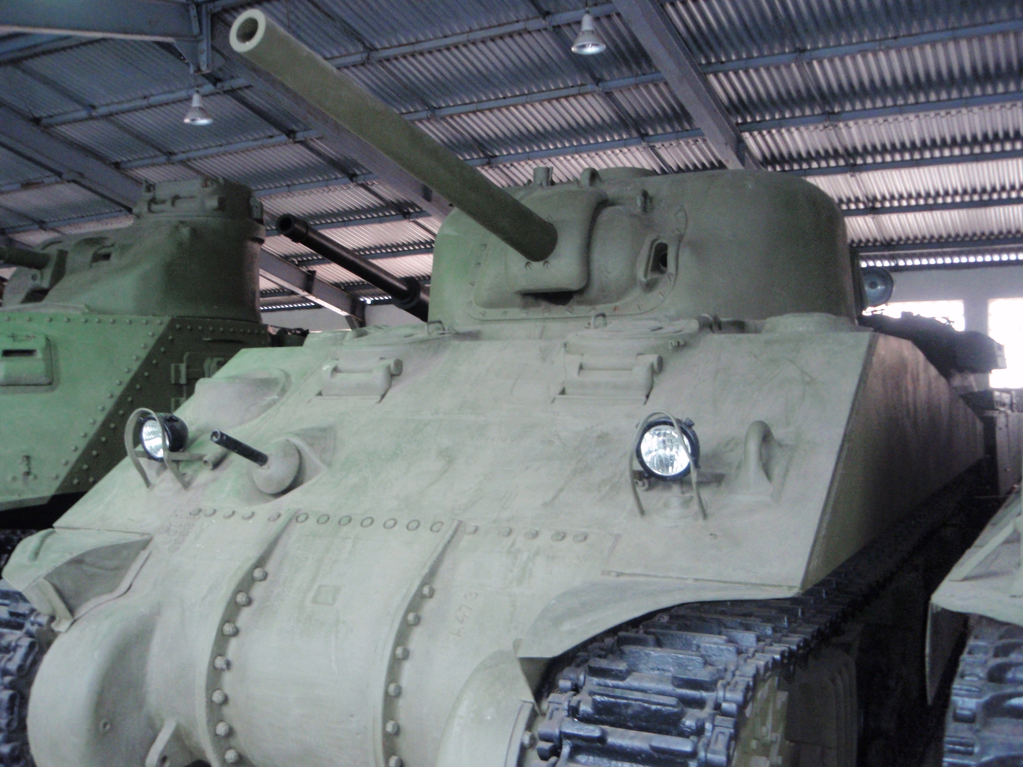 Американский средний танк M4A4 (Sherman) в Кубинке